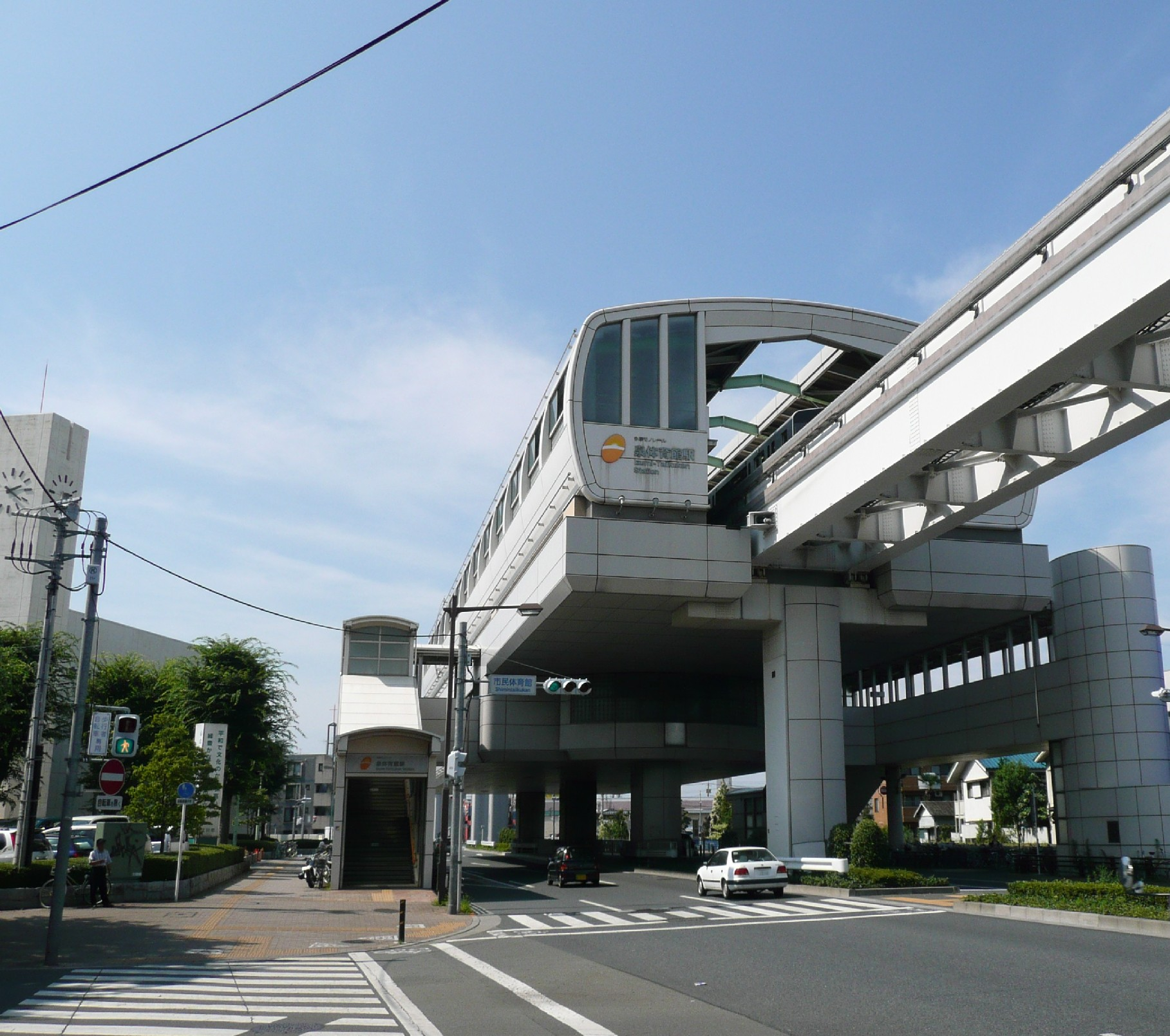 泉体育館駅